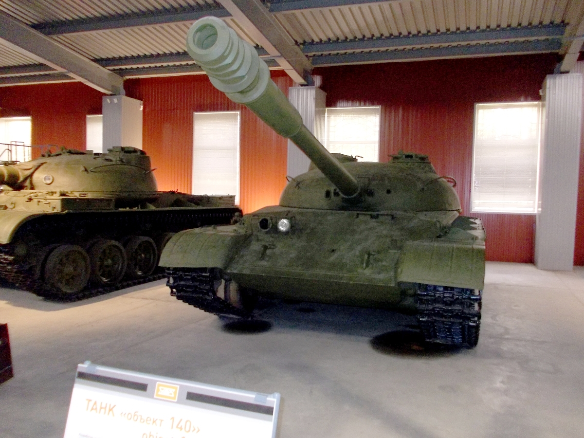 "Объект 140" в Музее бронетанковой техники (Нижний Тагил)